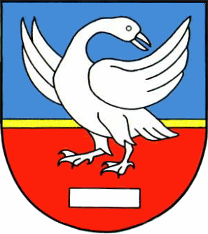 Wappen der Gemeinde Ganderkesee